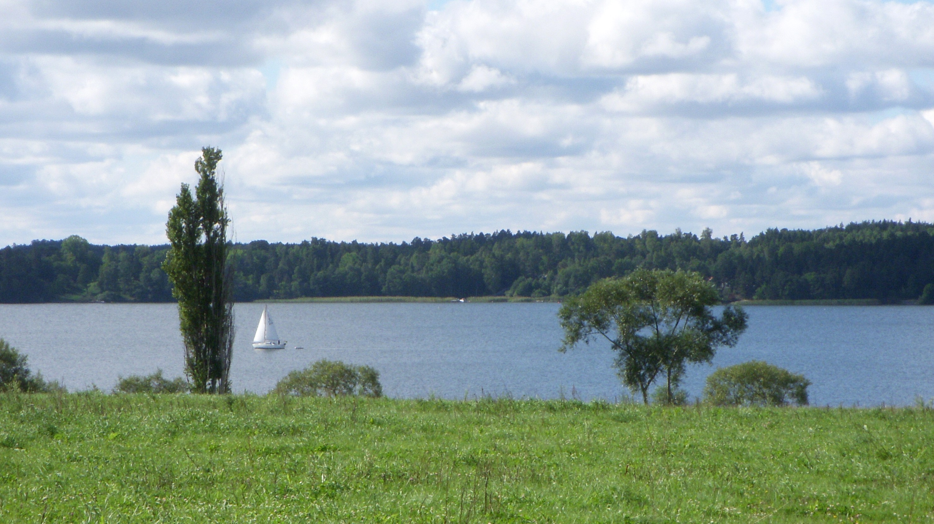 Färingsö, vy från Lövsta